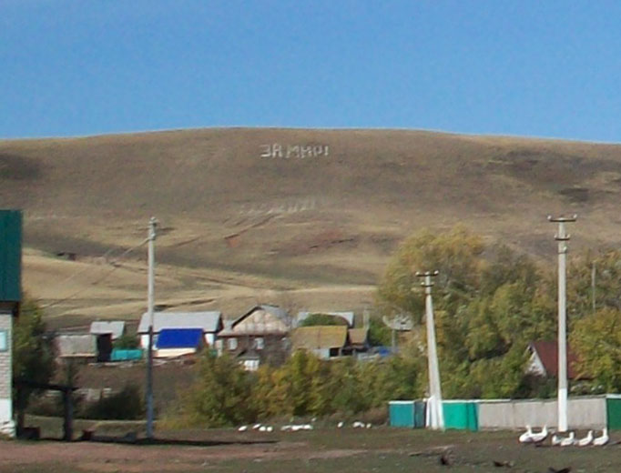 Выложенная из камней надпись "За мир!" на горе над с.Ташлы